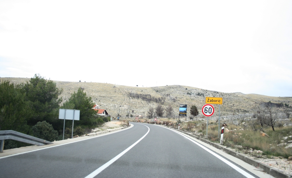 Split-Šibenik